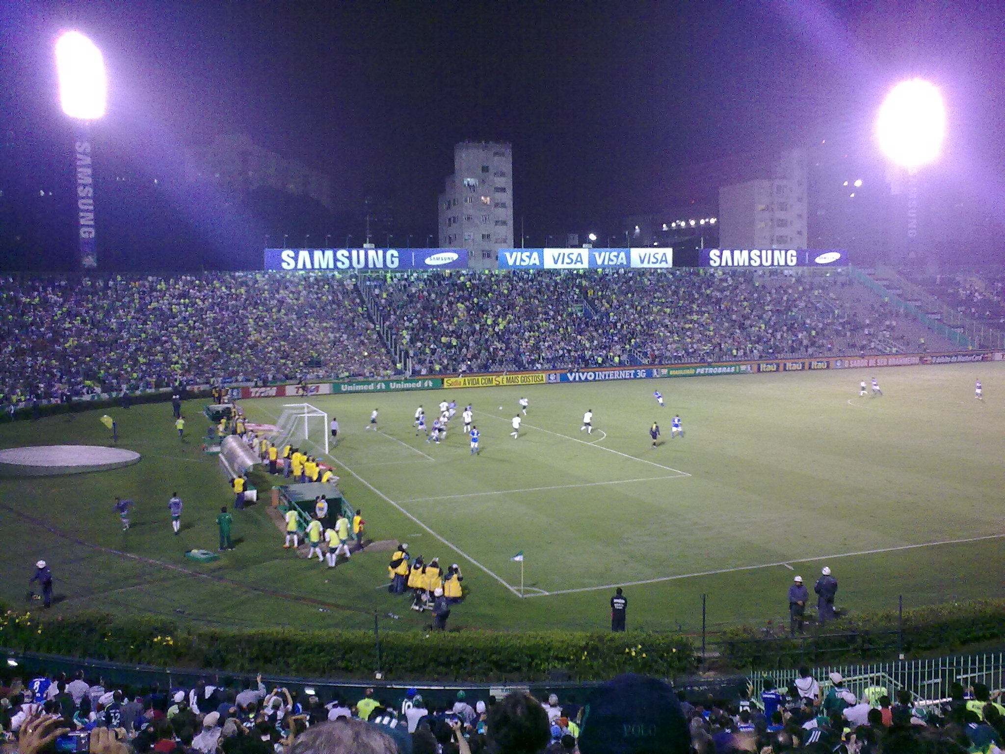 Palmeiras no ataque! No primeiro tempo, um monte de gols perdidos e alguns poucos sustos. No segundo tempo, um massacre, com quatro gols.